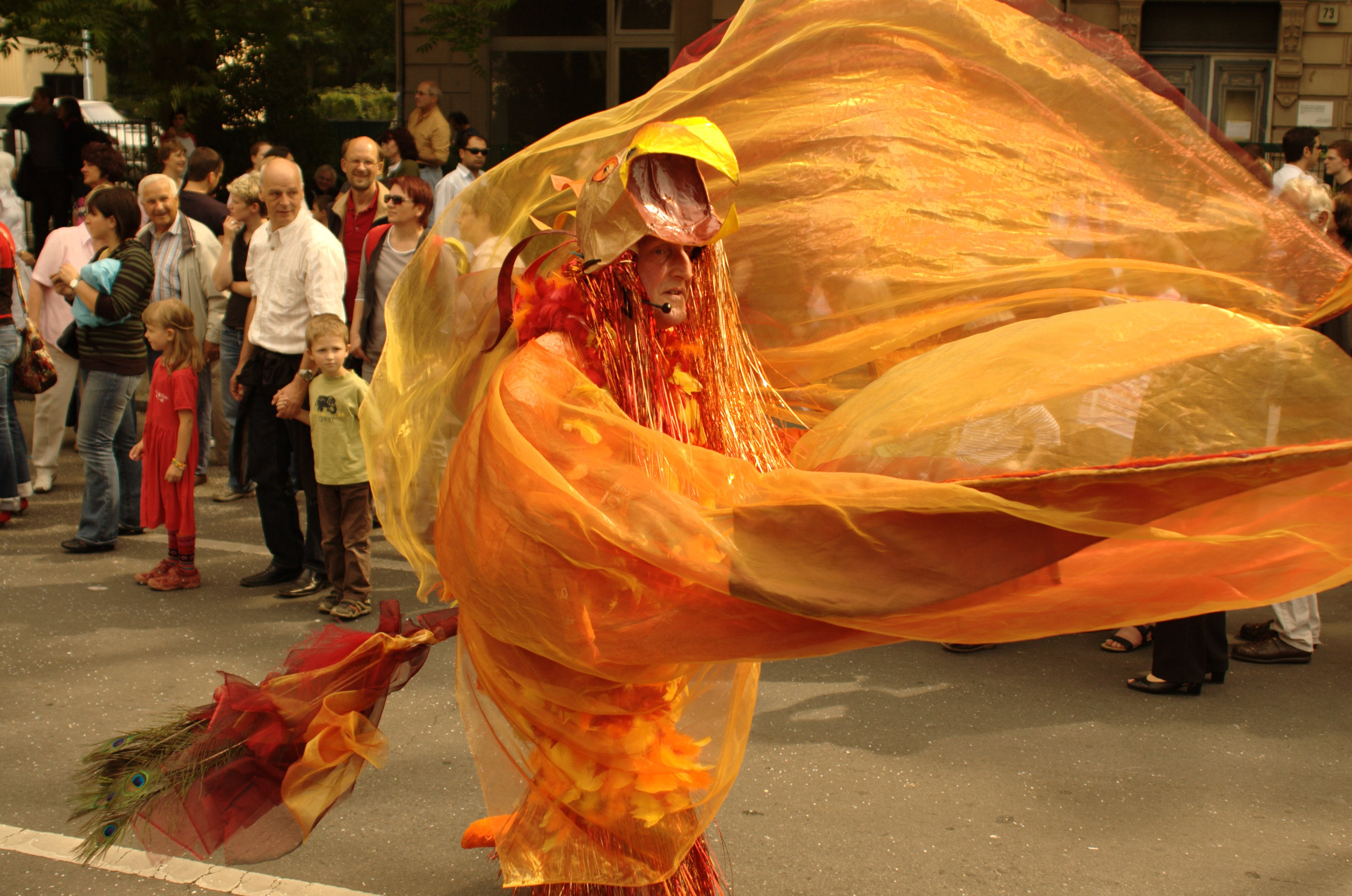 Karneval der Kulturen in Berlin 2009